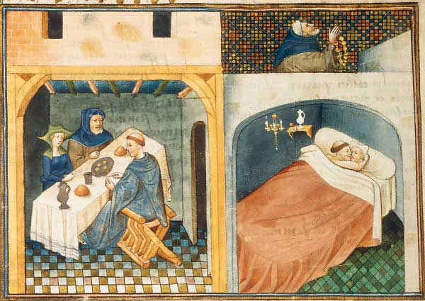 Decameron // -Ein Mönch zu Gast am Tisch eines Ehepaares / Der Mönch schläft mit der Frau, während der Ehemann betet.-Buchmalerei, französisch, 15.Jh. Aus: Le livre appellé Décaméron (...) de Jehan Boccace. Ms Arsenal 5070, fol.108 v